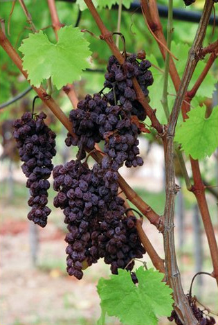 I grappoli sono completamente passiti.